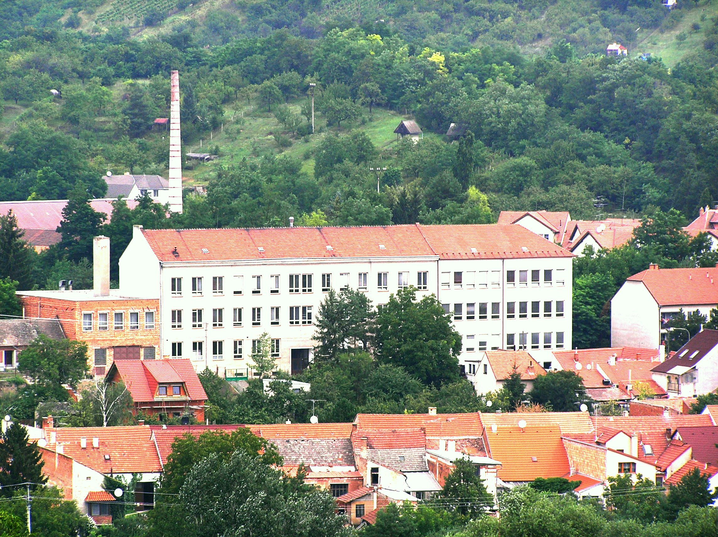 ZŠ Dolní Kounice - pohled zepředu